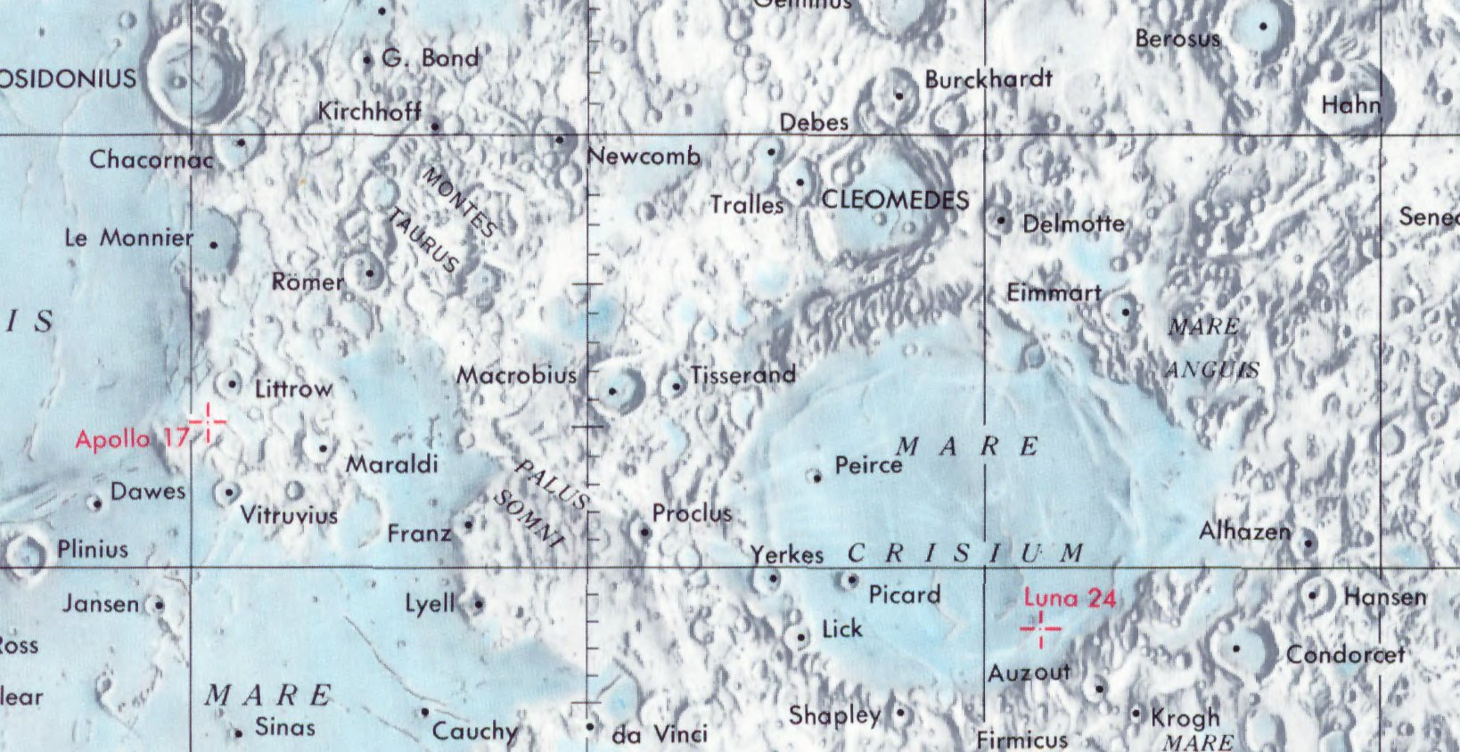 Cráter lunar Tisserand. Localización. (Lunar Chart LPC1. Second Edition)